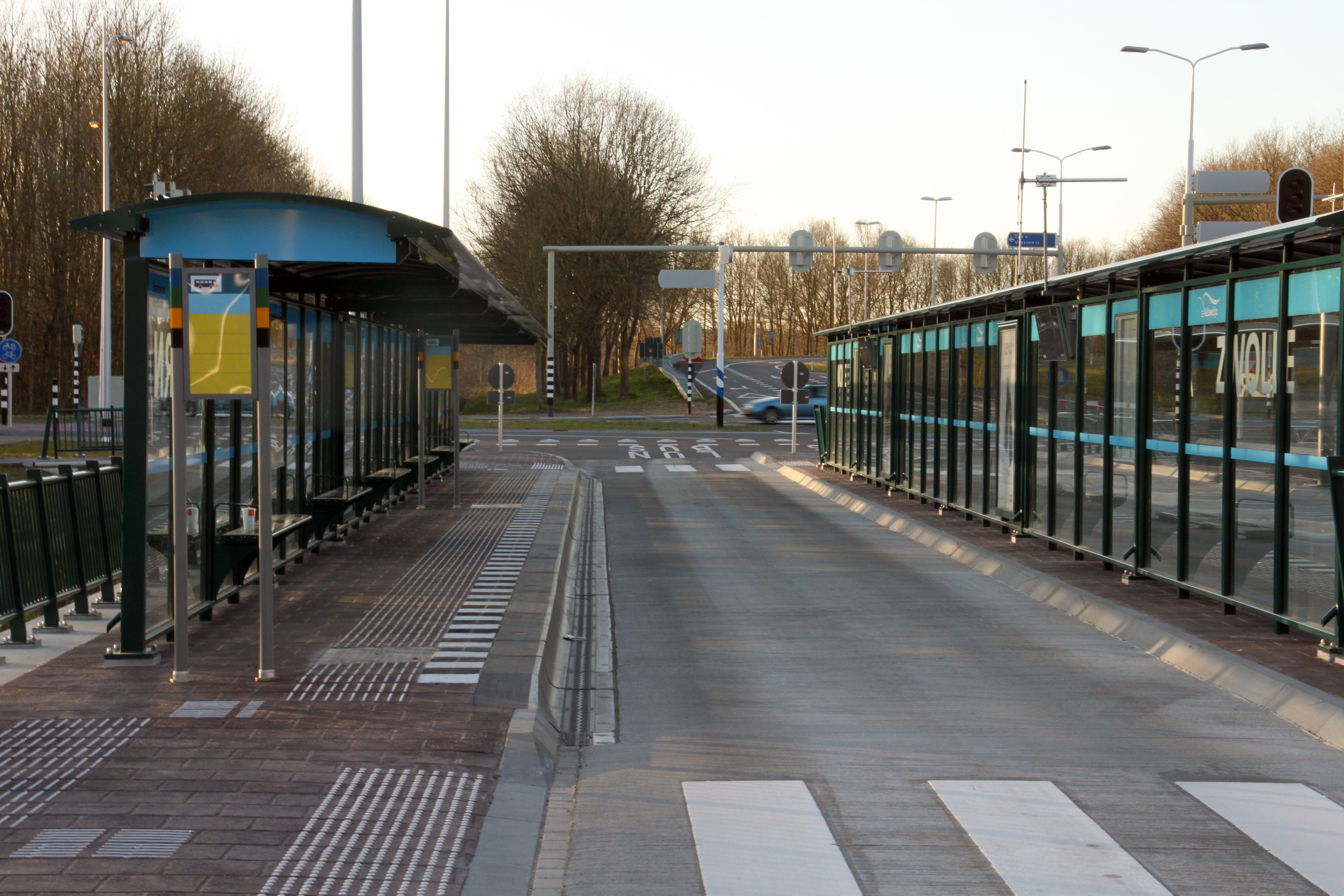 De HOV-bushalte bij transferium Horsthoek in Heerde.